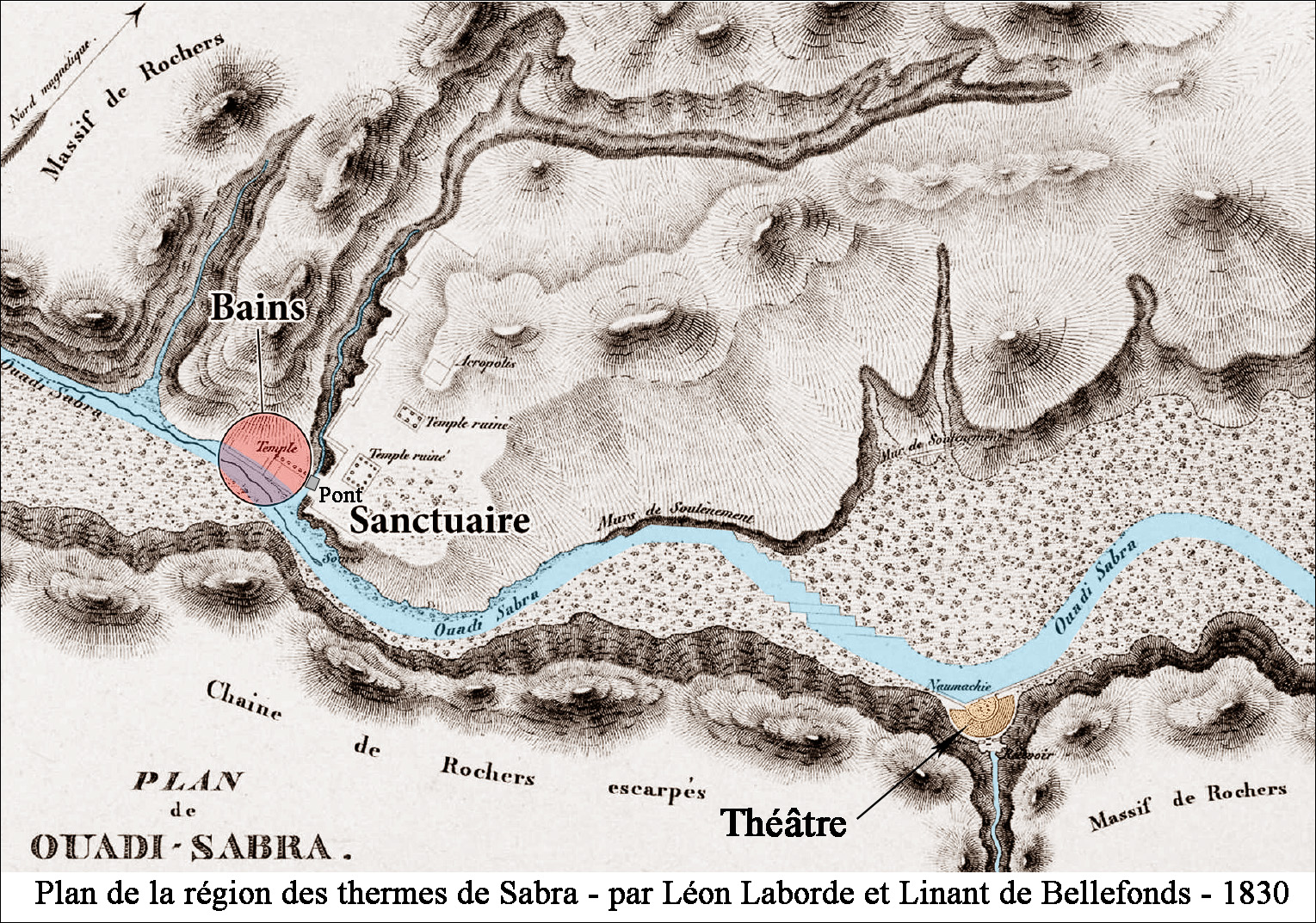 Plan de la région des thermes et du théâtre de Sabra par Leon Laborde et Linant de Bellefonds en 1830.